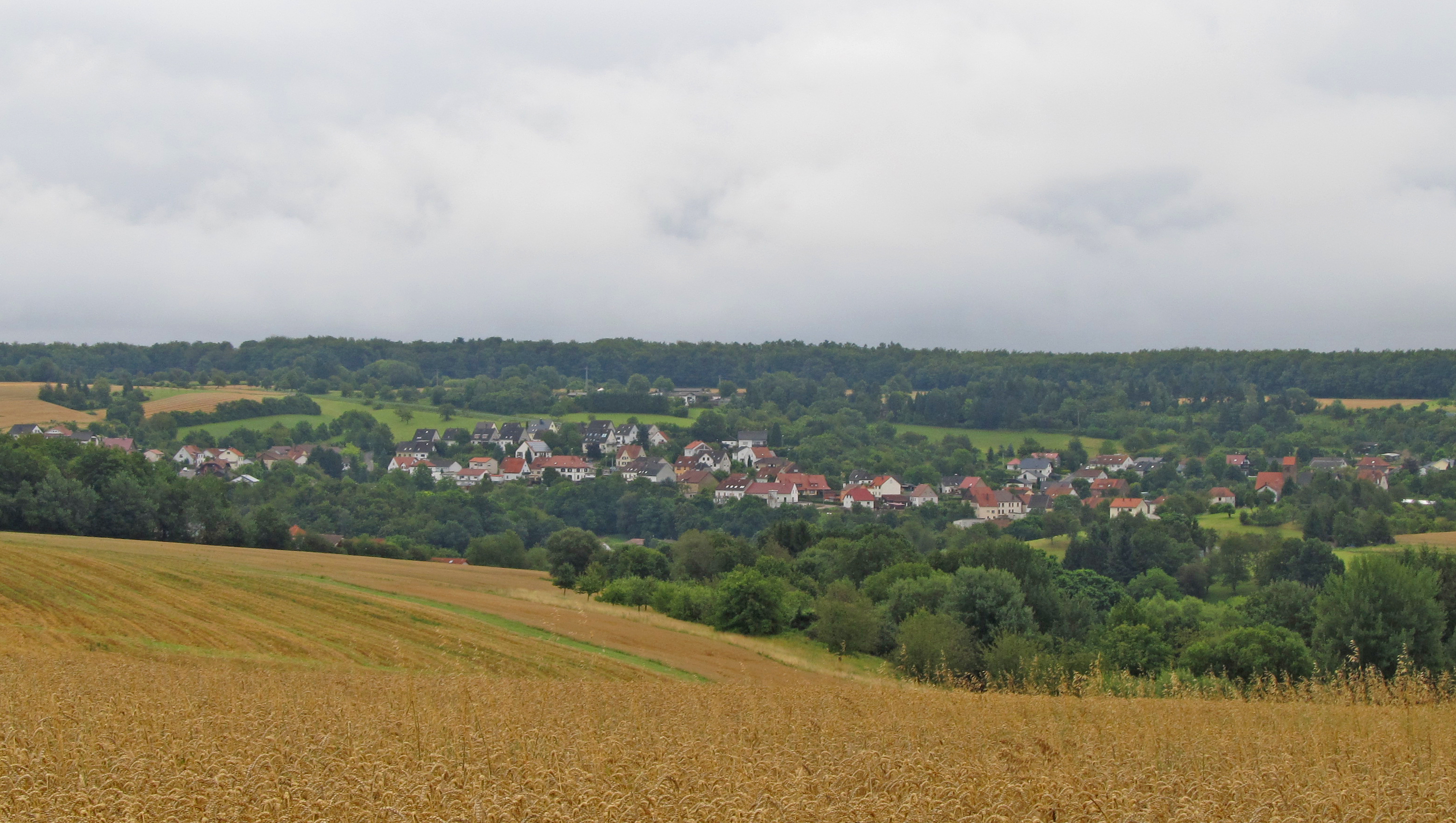 Blick auf Wattweiler, Stadt Zweibrücken, Rheinland-Pfalz